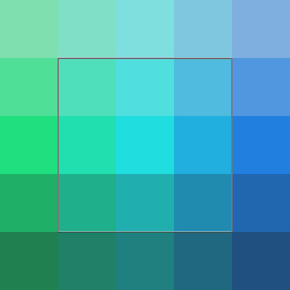 Схема основных внутренних оттенков цианового цвета